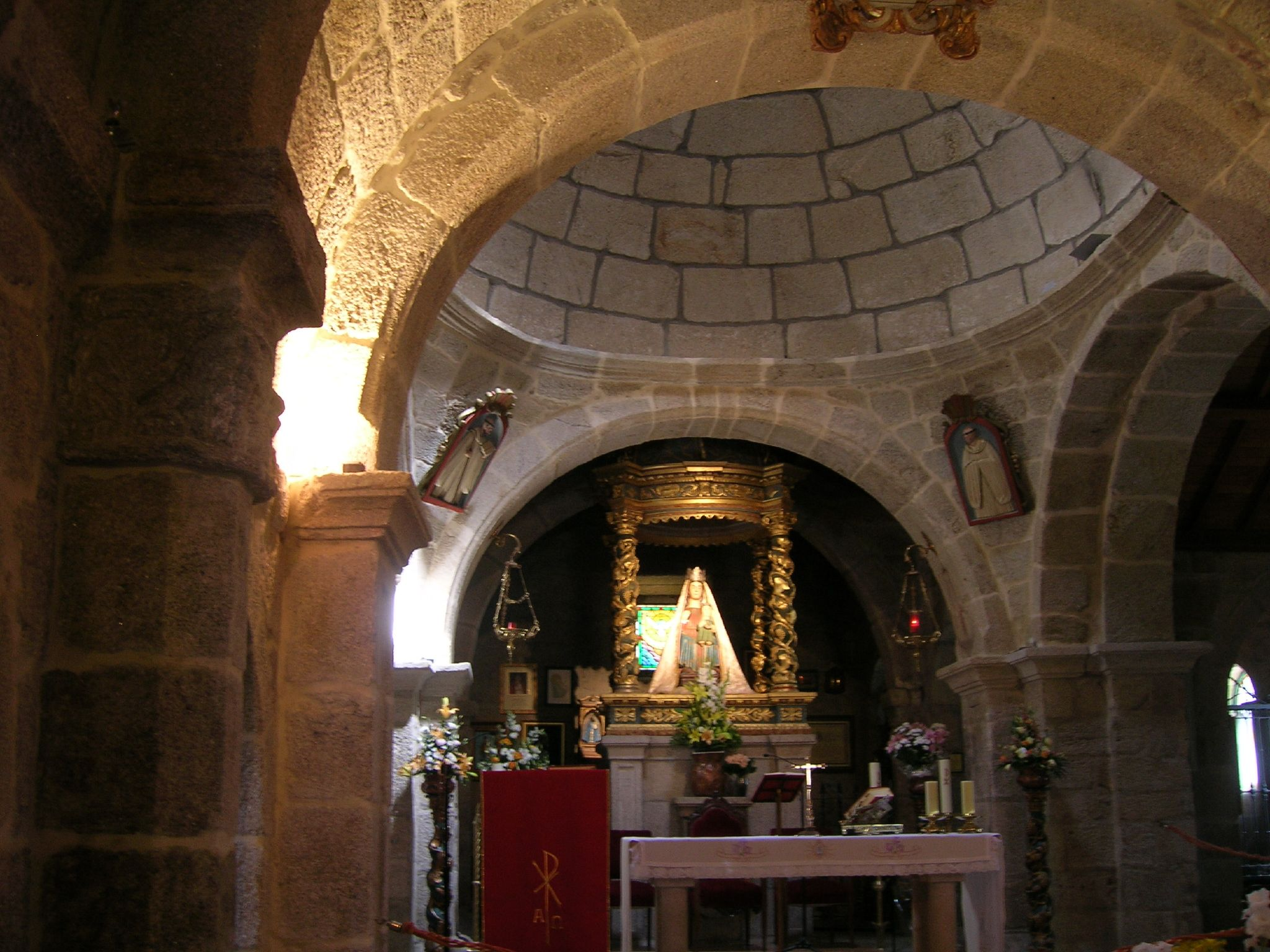 Imagen de la Virgen de A Franqueira ubicada en el ábside de la iglesia. Imaxe da Virxe da Franqueira localizada na ábsida da igrexa.